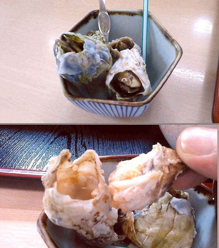 ミネフジツボの水煮客に提供される状態,ほじくり出してみた,フジツボの中身